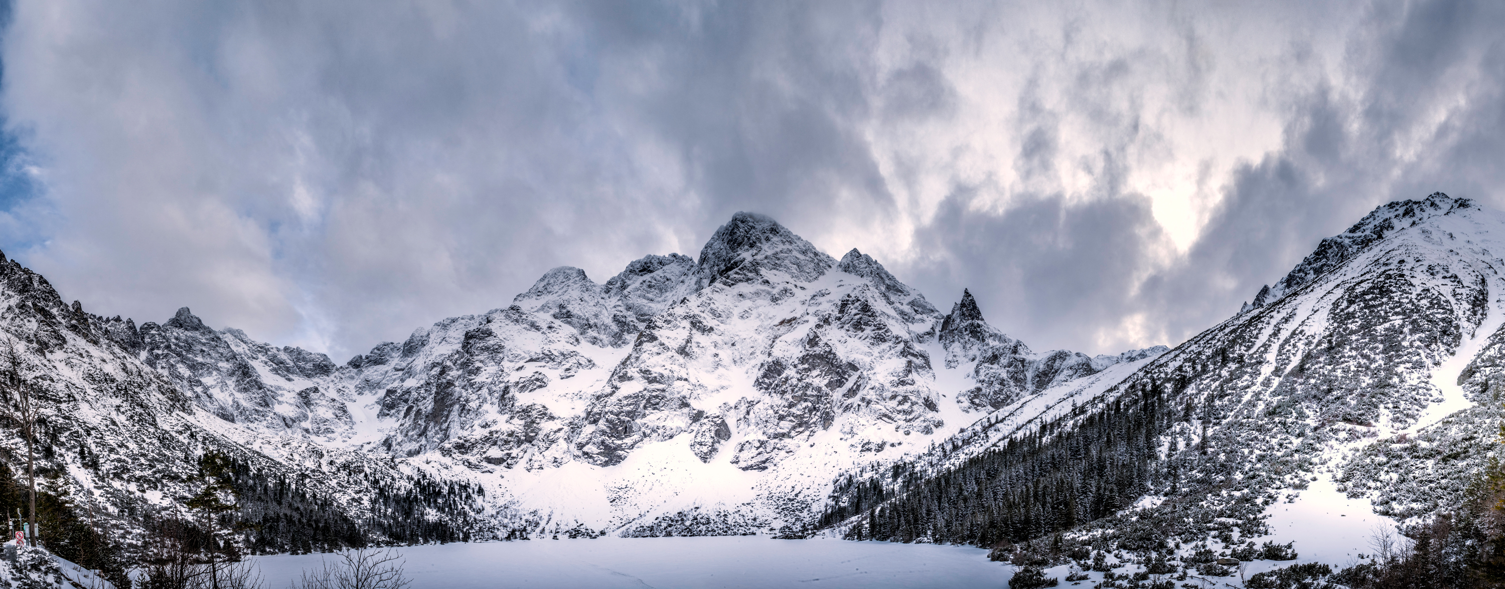 Tatrzański Park Narodowy This is a photography of protected area with CRFOP ID PL.ZIPOP.1393.PN.14